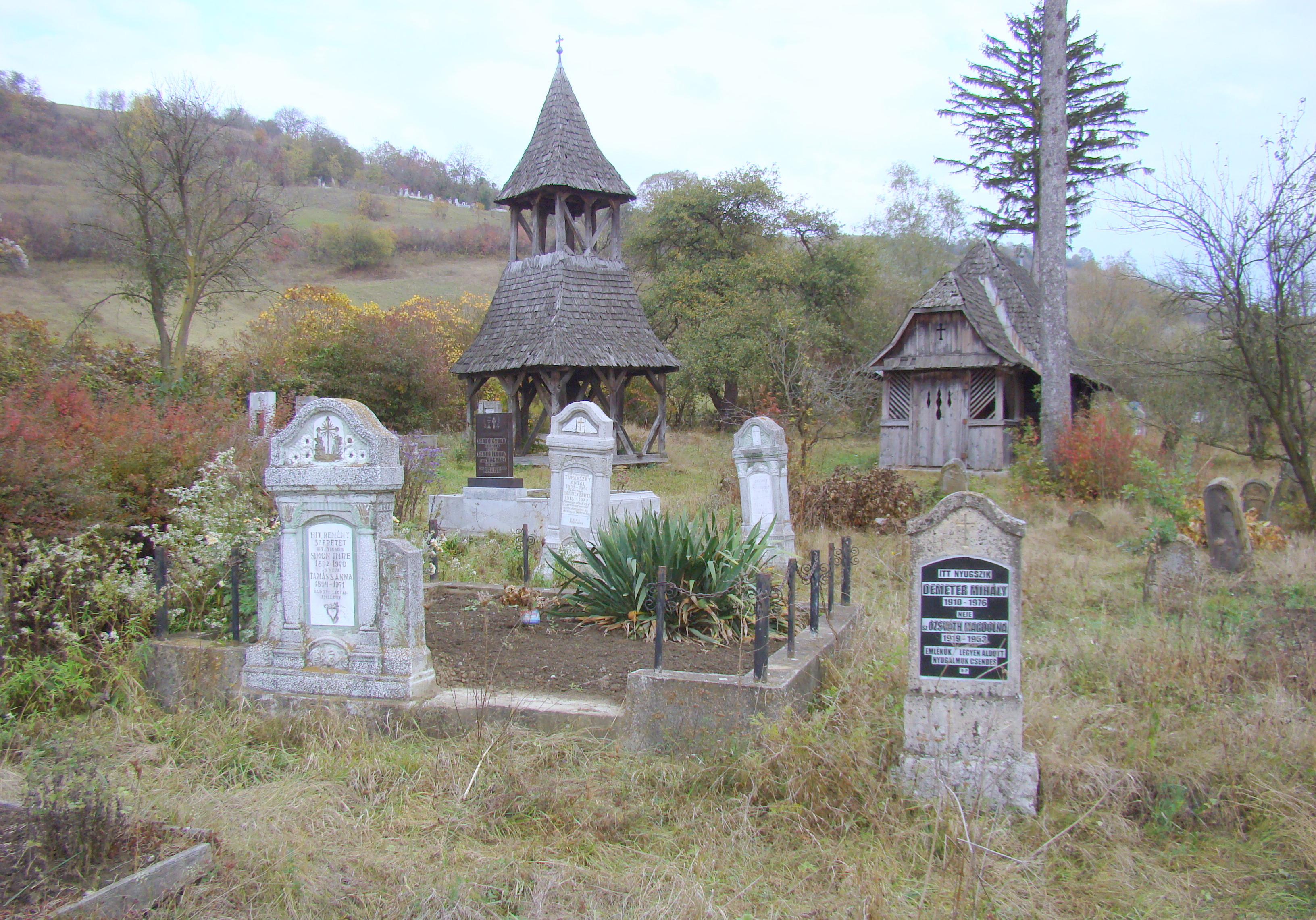 Biserica de lemn „Sf.Arhangheli” din Troița, județul Mureș